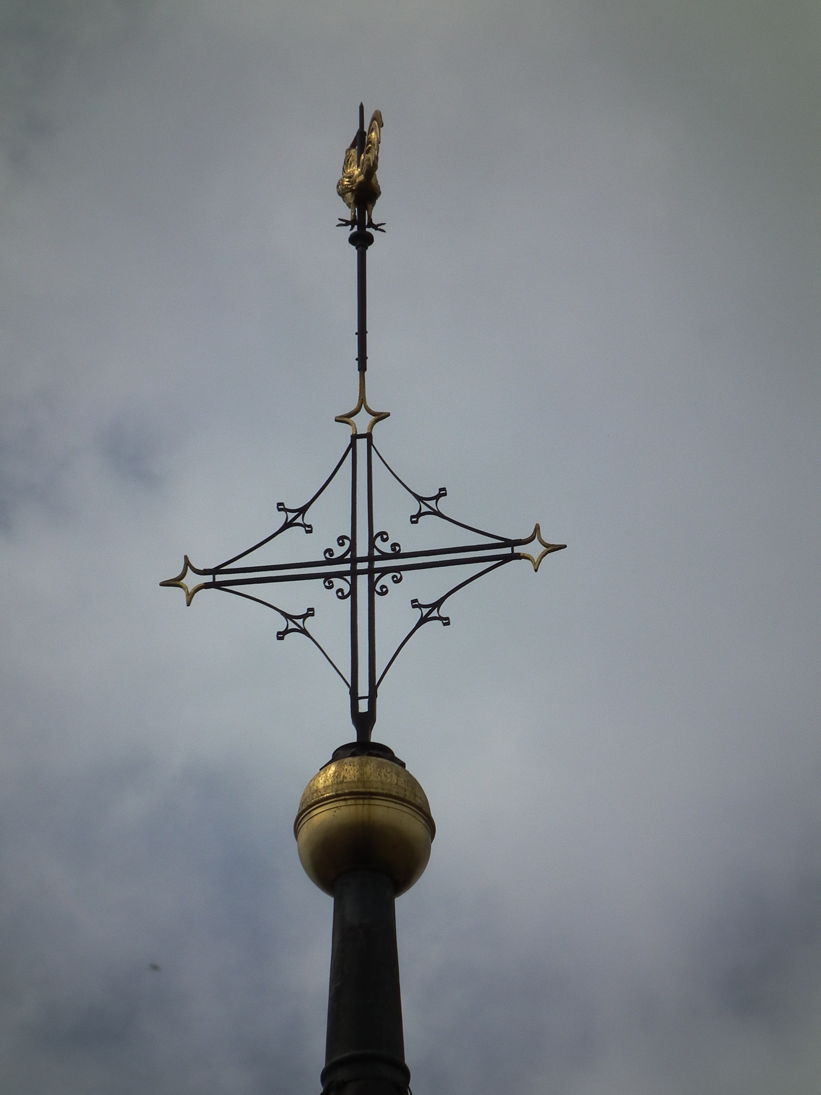 Katholische Kirche St. Pankratius in Offenbach-Bürgel (Hessen, Deutschland)